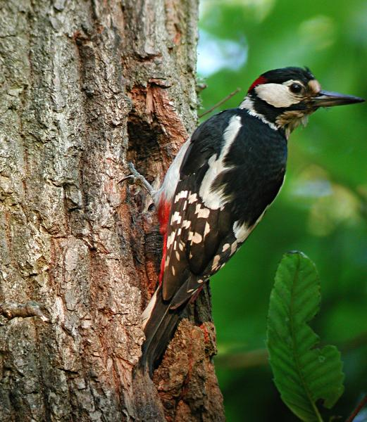 Pic épeiche (Dendrocopos major) en forêt de Ronqueux dans les Yvelines